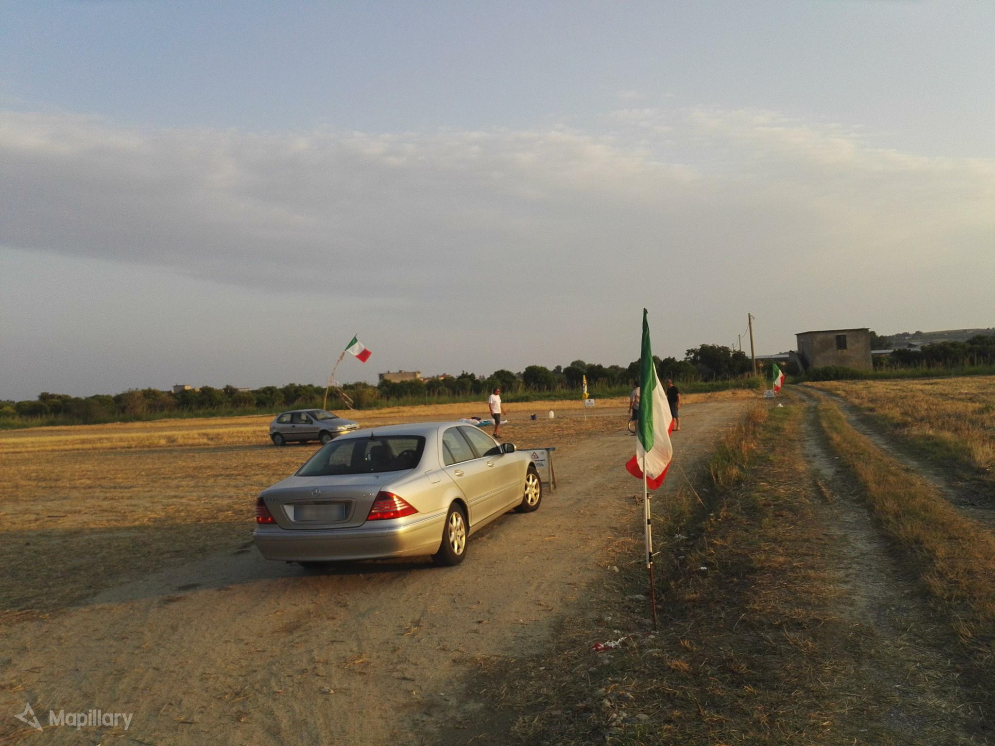 Campovolo Ali dello stilaro (Caldarella - Stilo)